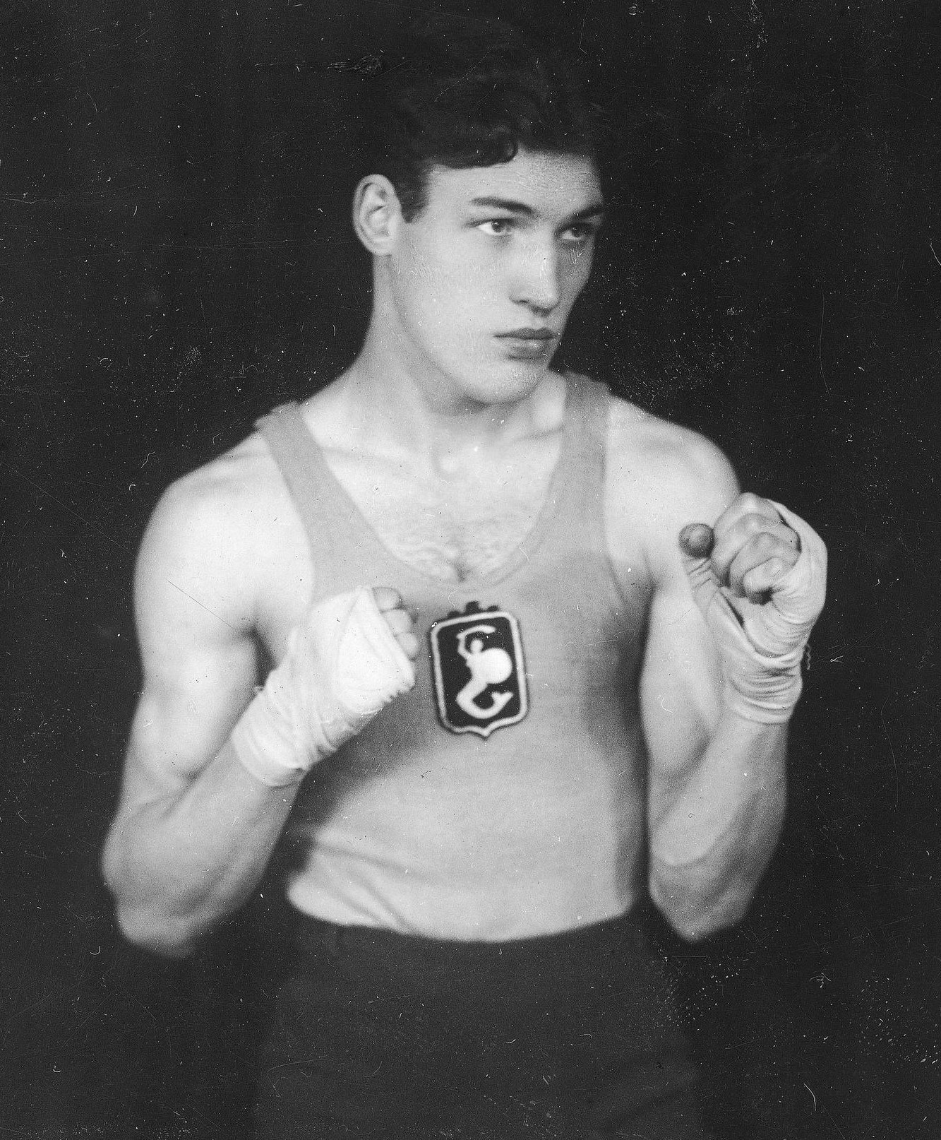 Bokser Antoni Kolczyński w 1939 w barwach klubu Syrena Warszawa